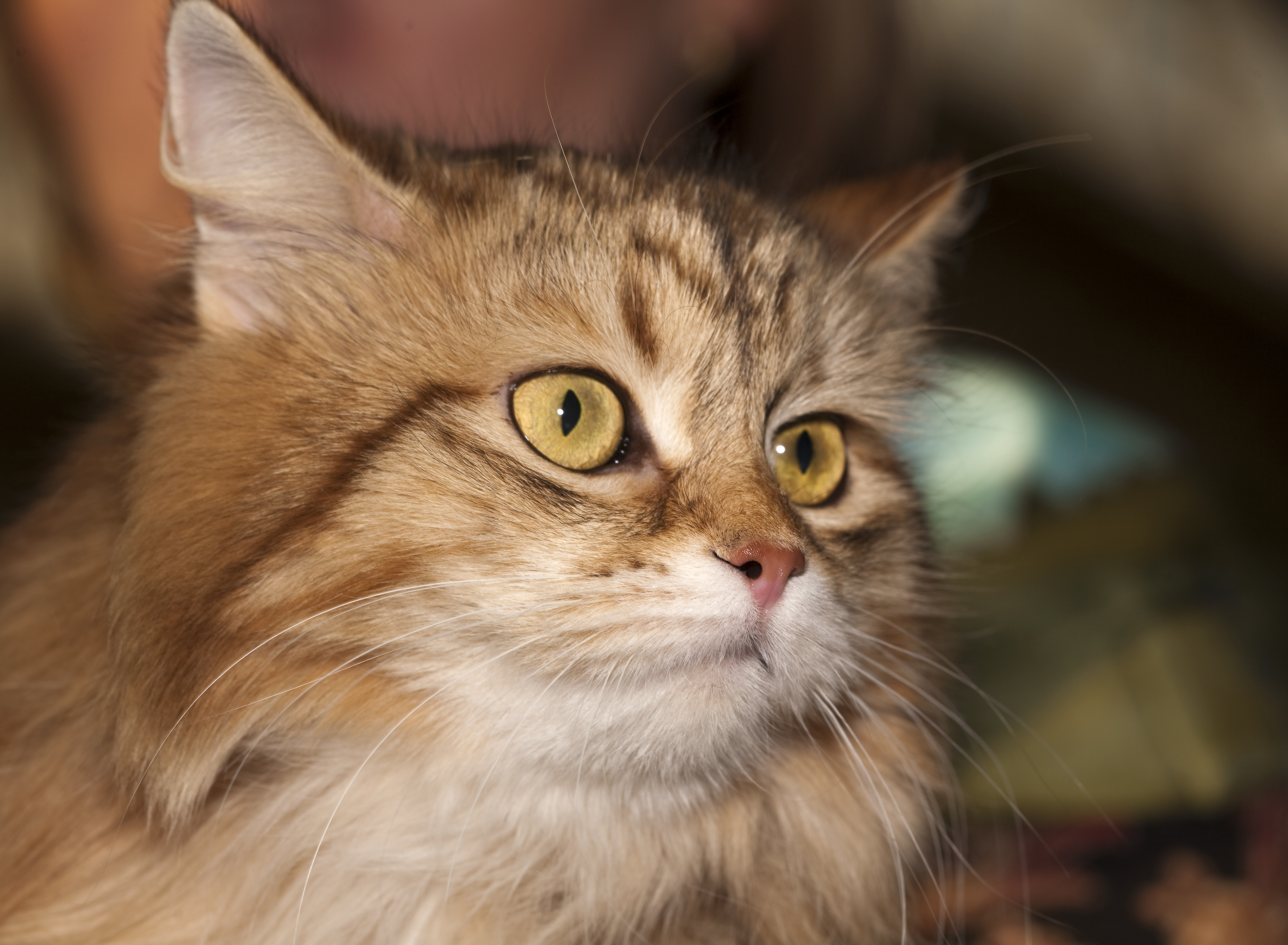 Сибирская кошка RU*Neva's Legend Kleopatra, №697 по каталогу выставки «Содружество-2010» (весна). Кошка. Окрас: золотой мраморный (SIB ny 22). Дата рождения: 07/12/2008. Владелец: Т.П.Ефимова. Клуб «Эйлур». Санкт-Петербург